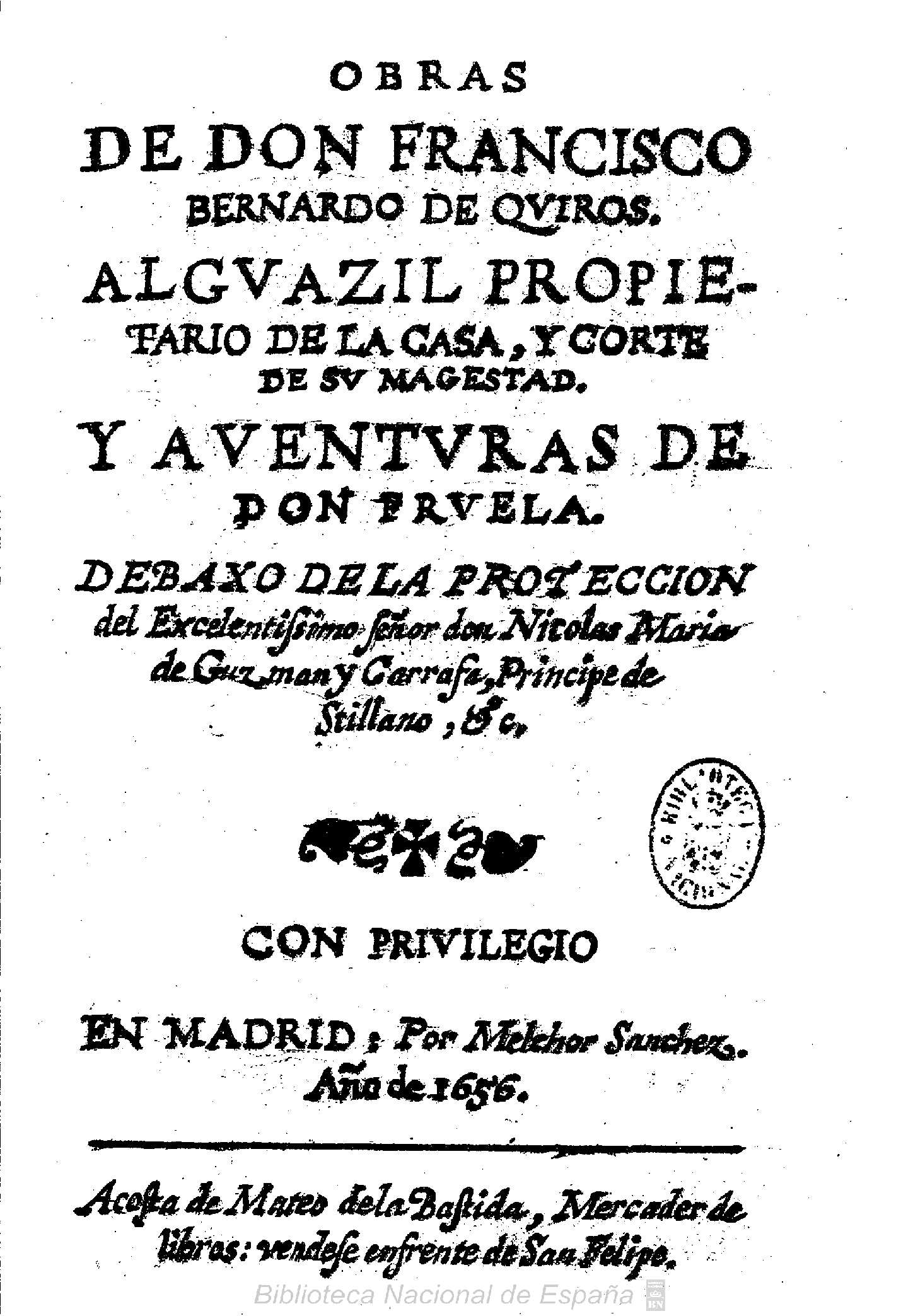 Obras de don Francisco Bernardo de Quiros ... y Auenturas de don Fruela ... Autor: Quirós, Francisco Bernardo de (1594-1668) Fecha: 1656 Datos de edición: En Madrid por Melchor Sanchez (Sánchez, Melchor (fl. 1651-1687)) acosta de Mateo de la Bastida ...